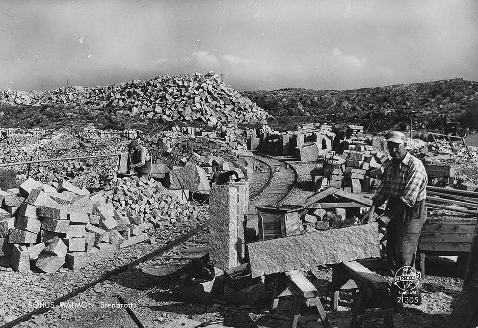 Bohus-Malmön. Stenbrott